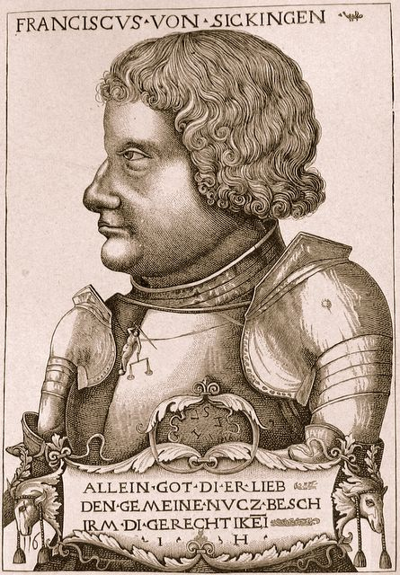 Franz von Sickingen. Bildunterschrift: "Allein Gott die Ehr, lieb den Gemeinnutz, beschirm die Gerechtigkeit". I[eronymus] H[opfer].